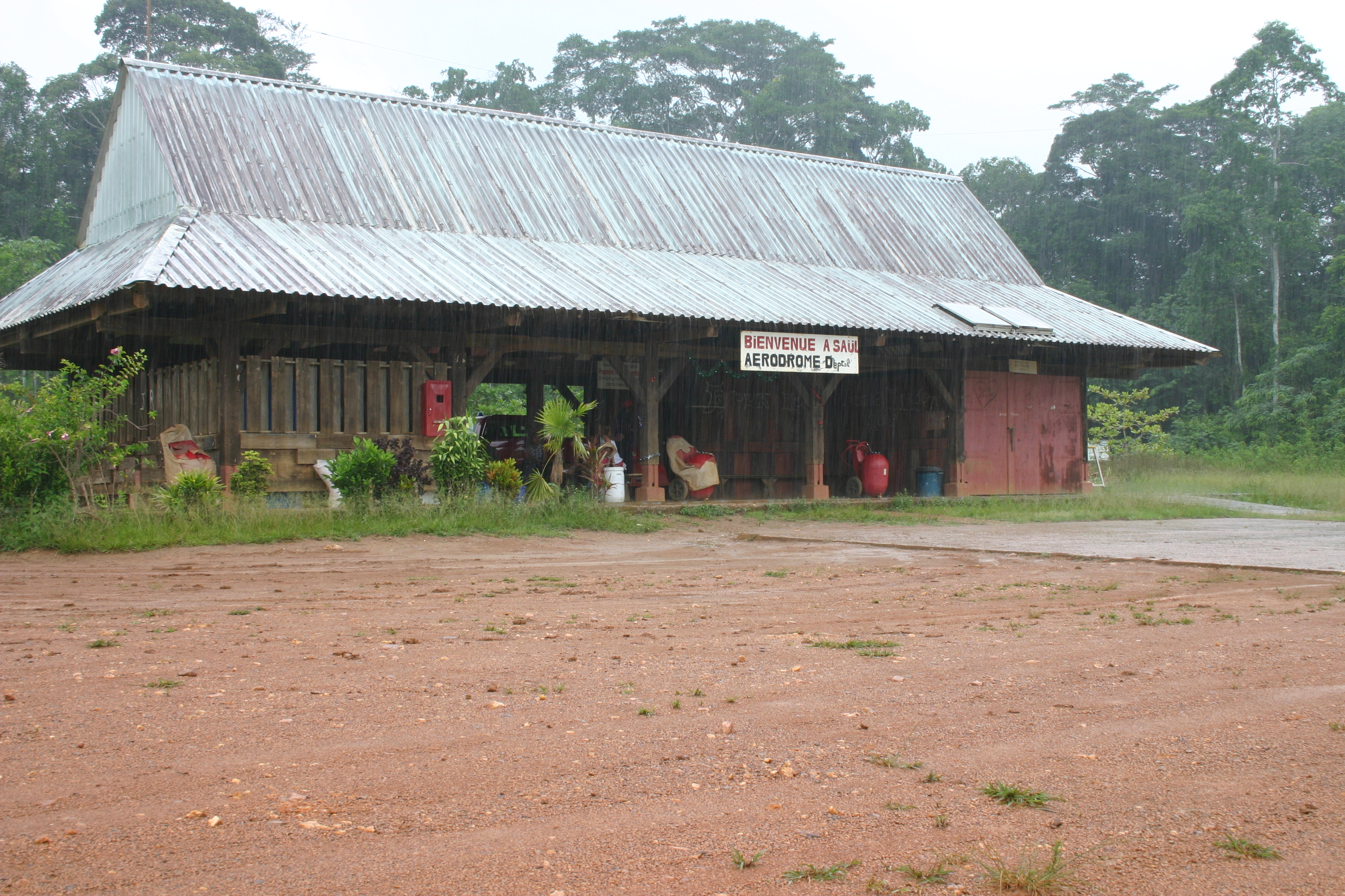 Saül (Guyane française) aérogare fevrier 2005